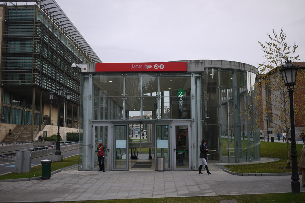 Estación de Llamaquique. Calle Coronel Aranda, Oviedo.